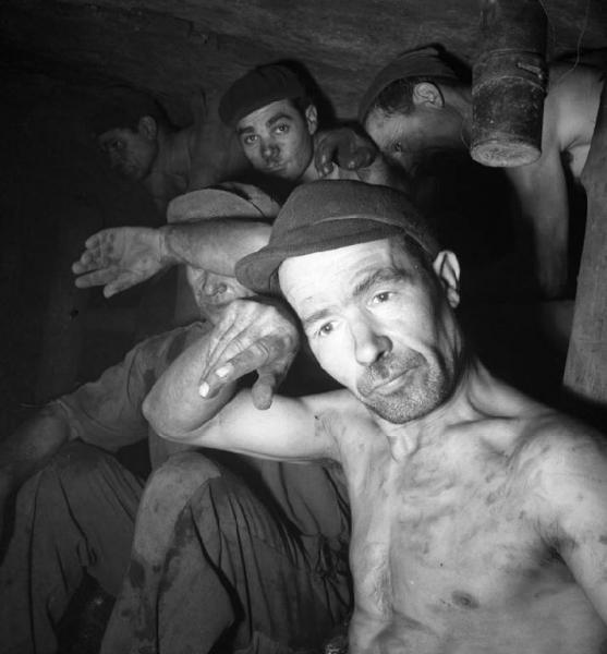 Sardegna - Carbonia - miniera di carbone - ritratto di gruppo - minatori